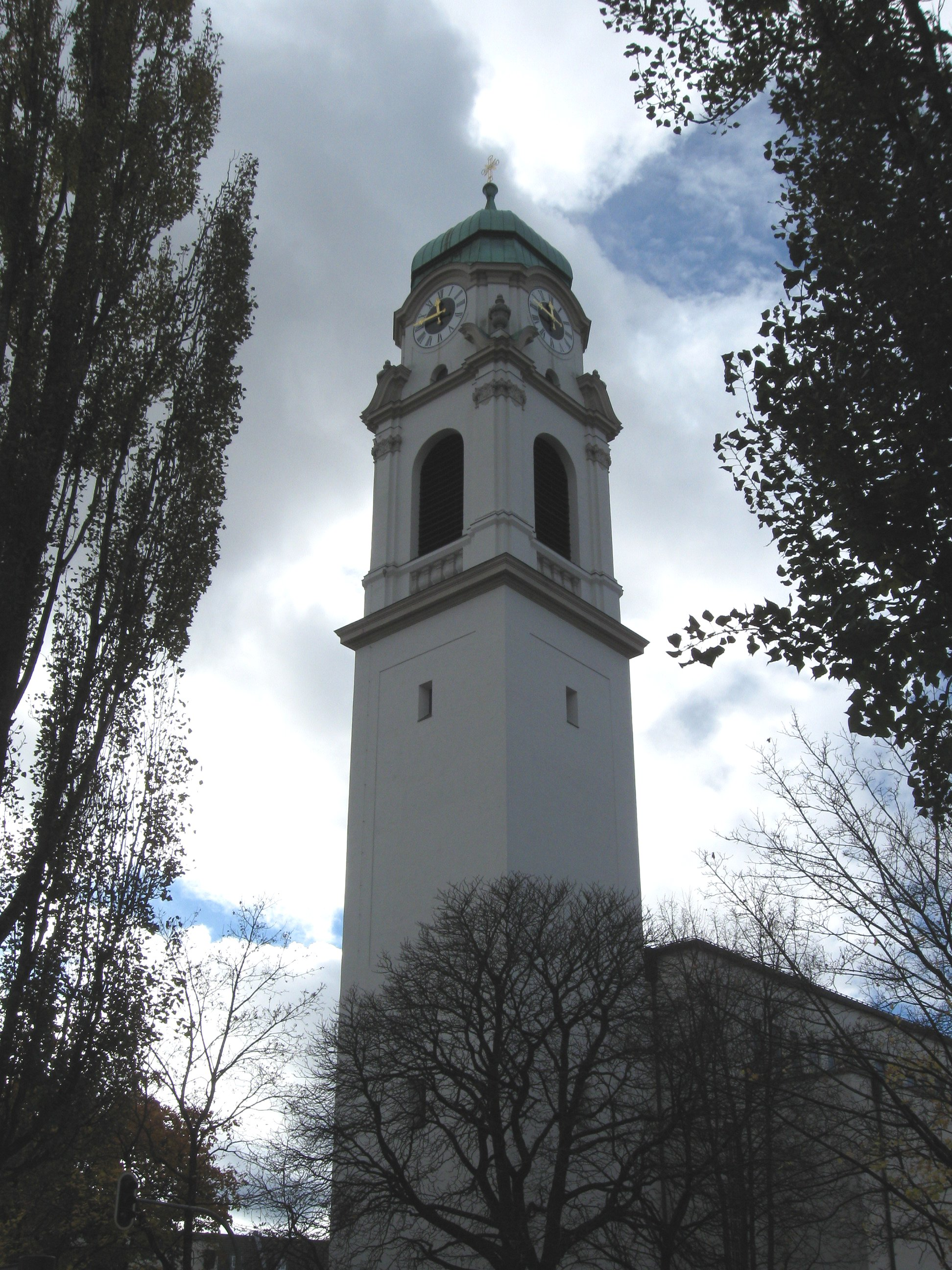 St.-Wolfgangs-Platz 8a; Neubau Kath. Pfarrkirche St. Wolfgang, vom Vorgängerbau hoher Neubarockturm, 1915-20 von Hans Schurr.